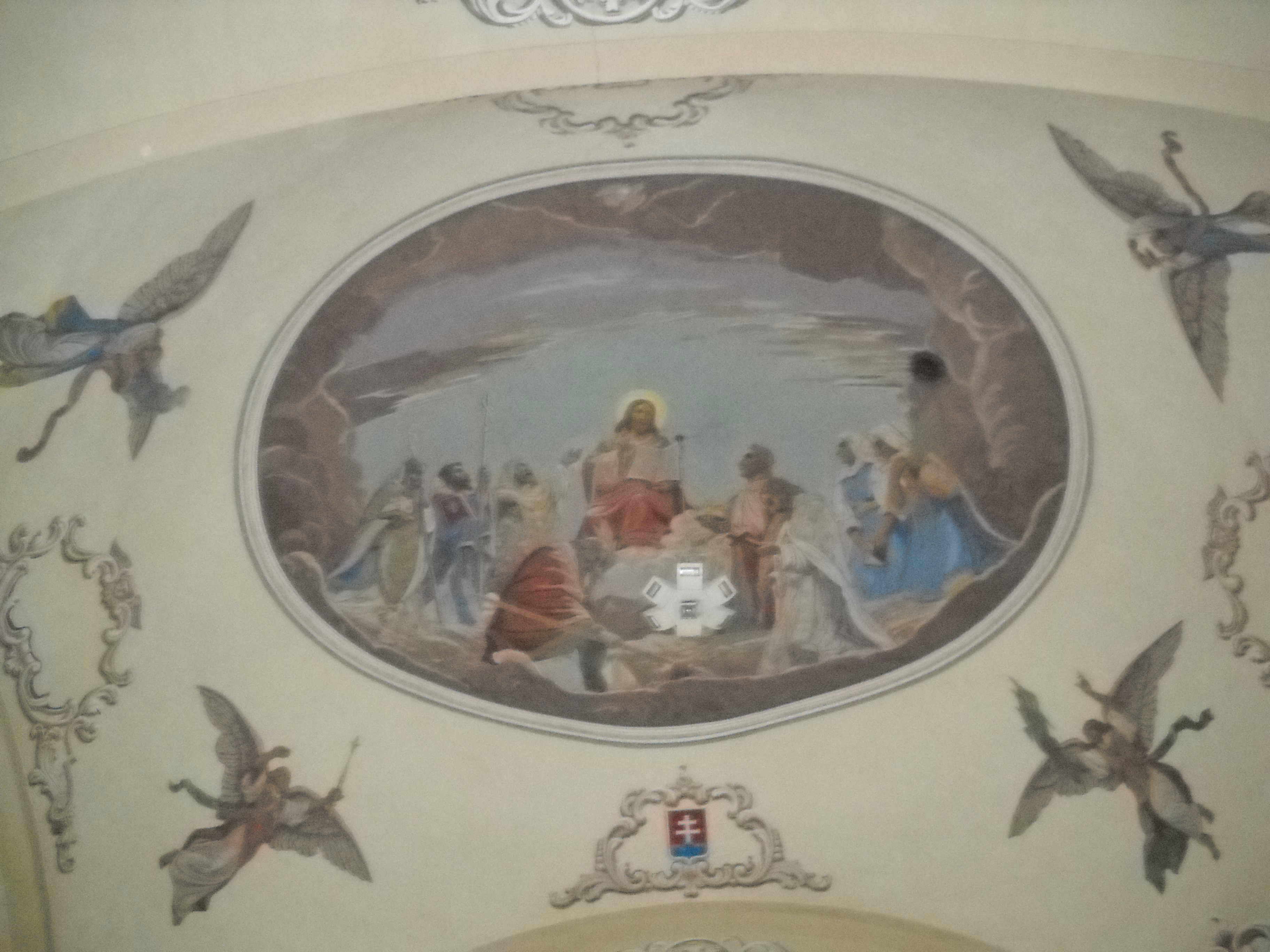 Najstaršia zachovalá maľba kostola, ktorú namaľoval známy slovenský maliar Jozef Hanula so svojími žiakmi na objednávku krasňanského farára za 270 tis. Kčs. Namaľoval ju v roku 1927. Je kysuckou kúlturnou pamiatkou. Na maľbe je namaľovaný v prostriedku maľby Ježiš Kristus, na ľavom boku sv. Bystrík, sv. Cyril a Metod, pod nimi sv. Vojtech, sv. Ján Nepomucký, nad ním sv. Václav a na pravom boku sv. Alžbeta a sv. Anežka.